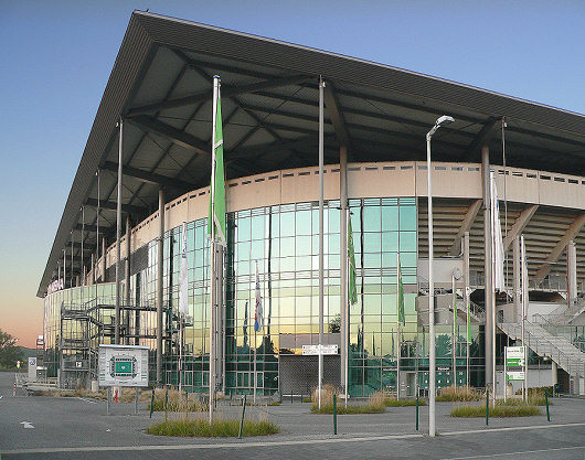 Fassade der Volkswagen Arena, Vorderseite Benutzer:Axel Hindemith, Oktober 2005